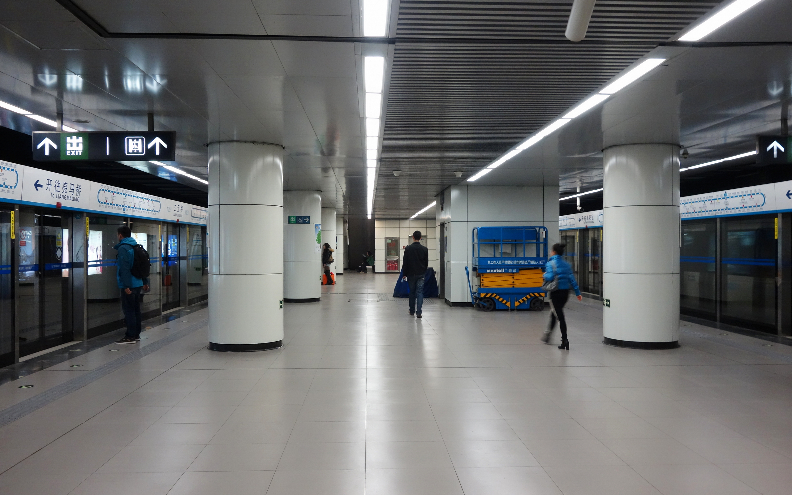 三元桥站10号线站台